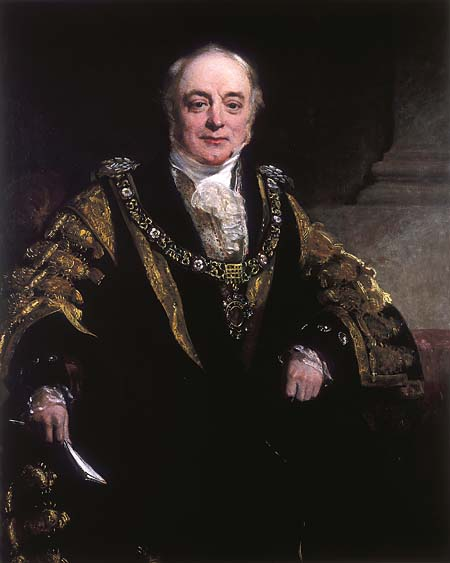 John Musgrove, Lord Mayor von London des Jahres 1850